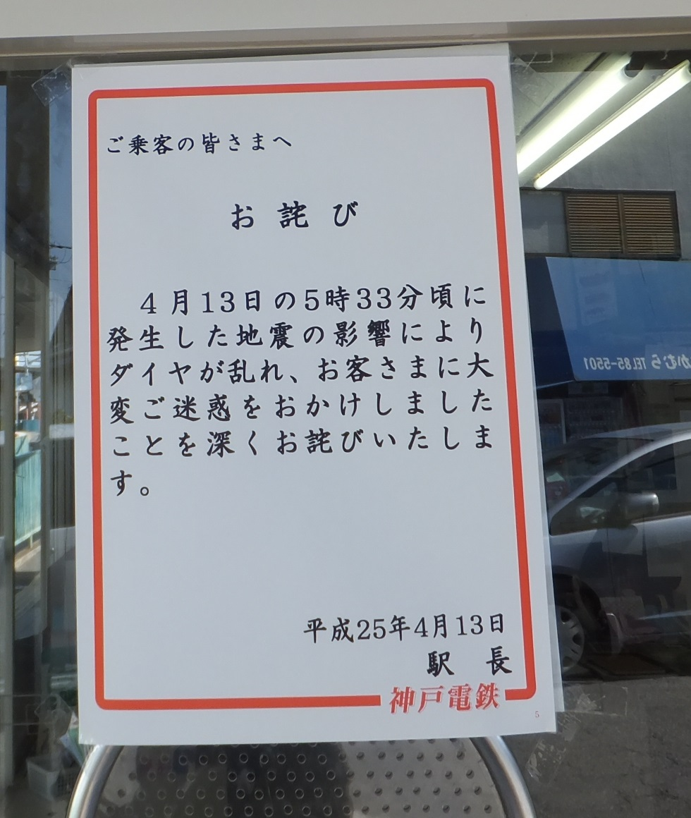 神戸電鉄粟生線志染駅で淡路島地震によって列車ダイヤが乱れたことをお詫びしていることを書いている張り紙